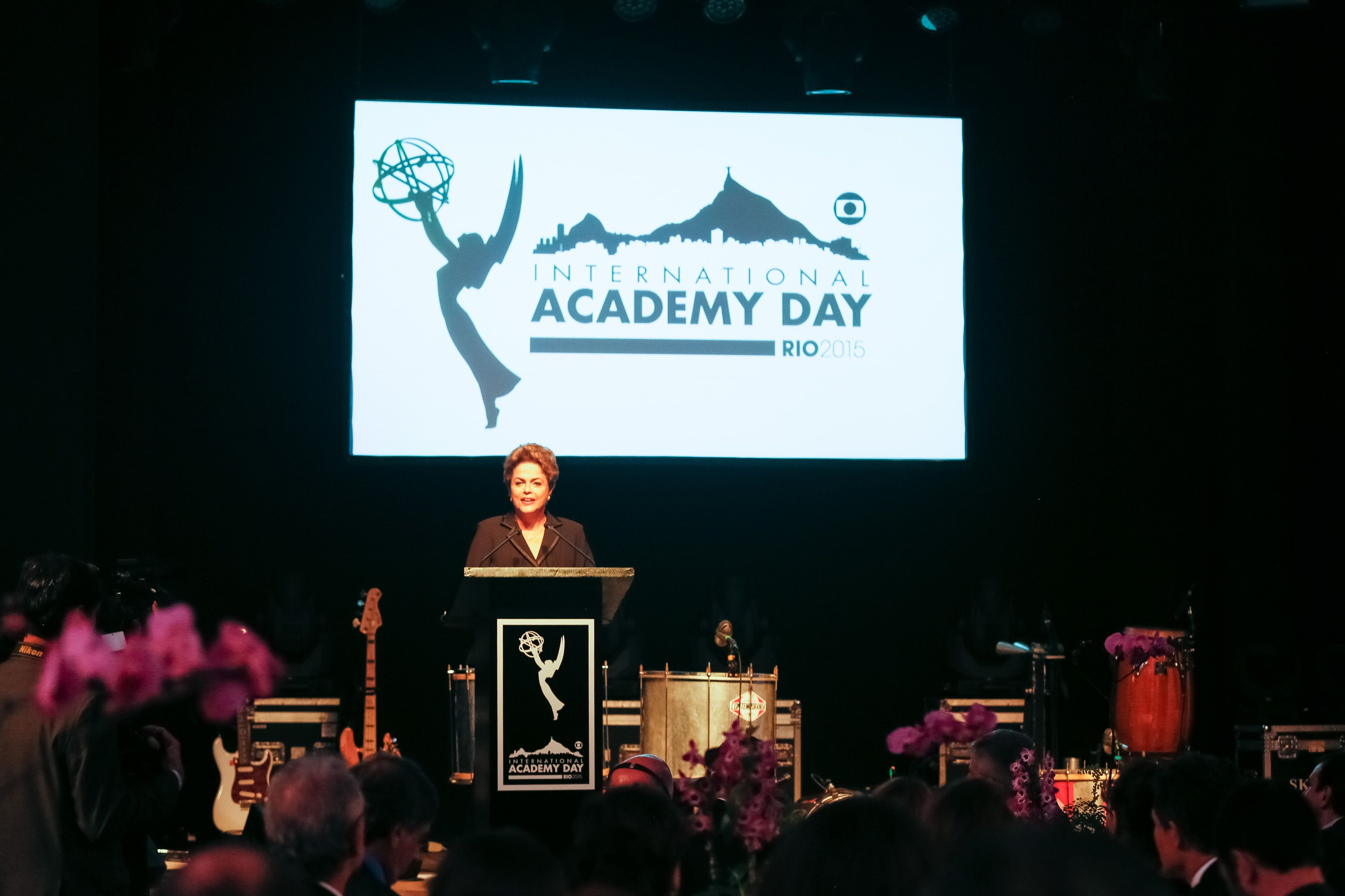 A Presidente brasileira Dilma Rousseff discursa durante a abertura do International Academy Day 2015, evento anual criado pela International Academy of Television Arts & Sciences, instituição que promove a premiação do Emmy, realizado na cidade do Rio de Janeiro.